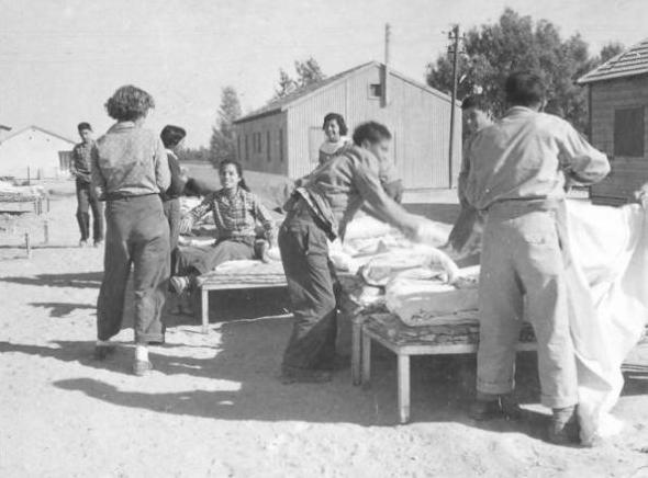 מאווררים את המיטות במוסד החינוכי במרחביה